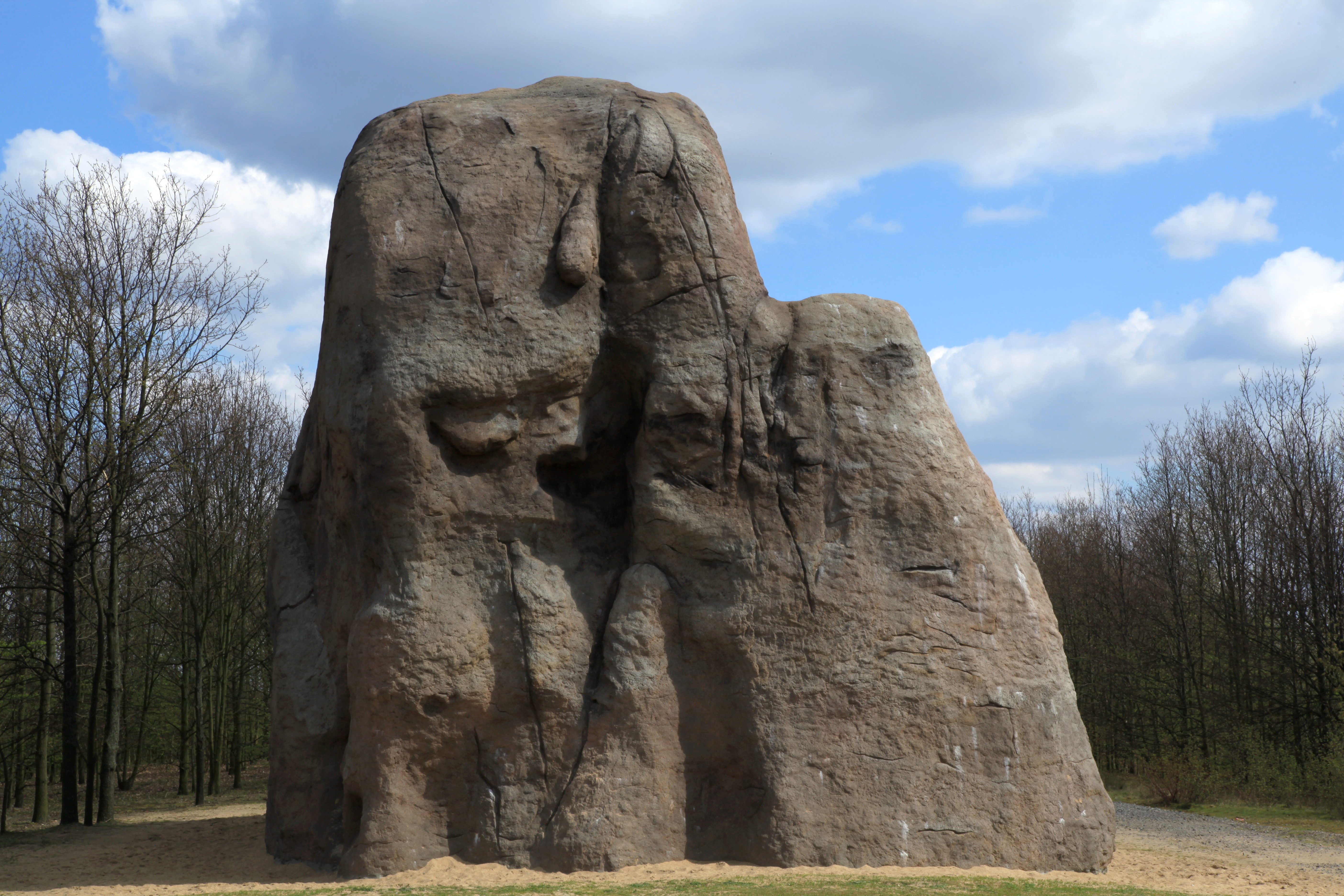 Monument for a forgotten Future, Wilde Insel, An den Schleusen in Gelsenkirchen